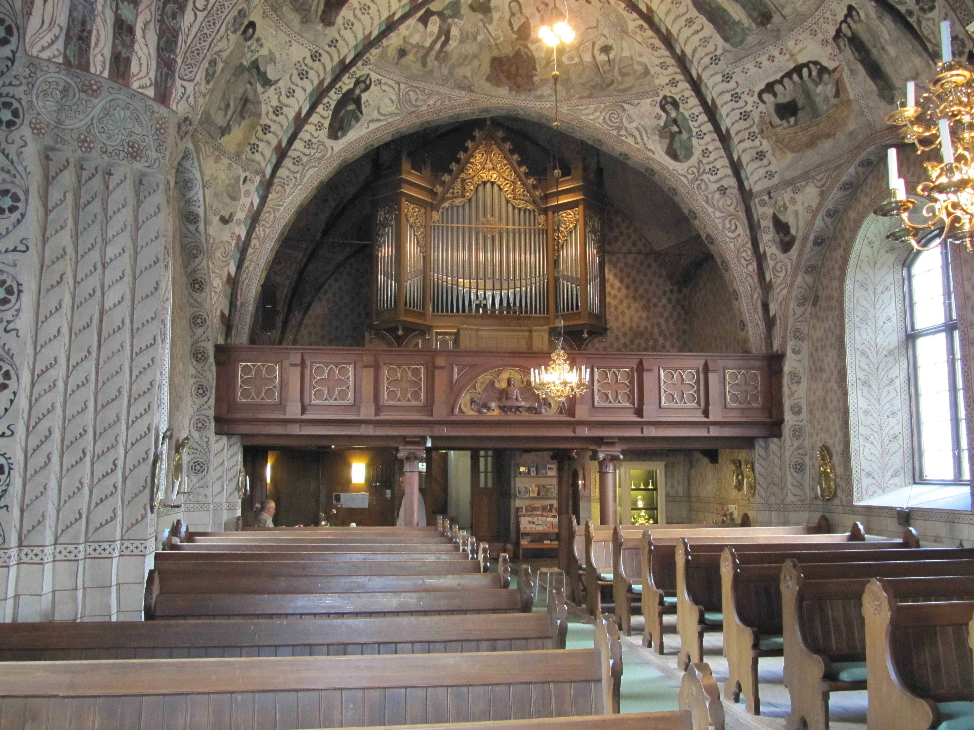 Kyrkorum i Odensala kyrka i riktning mot orgelläktare